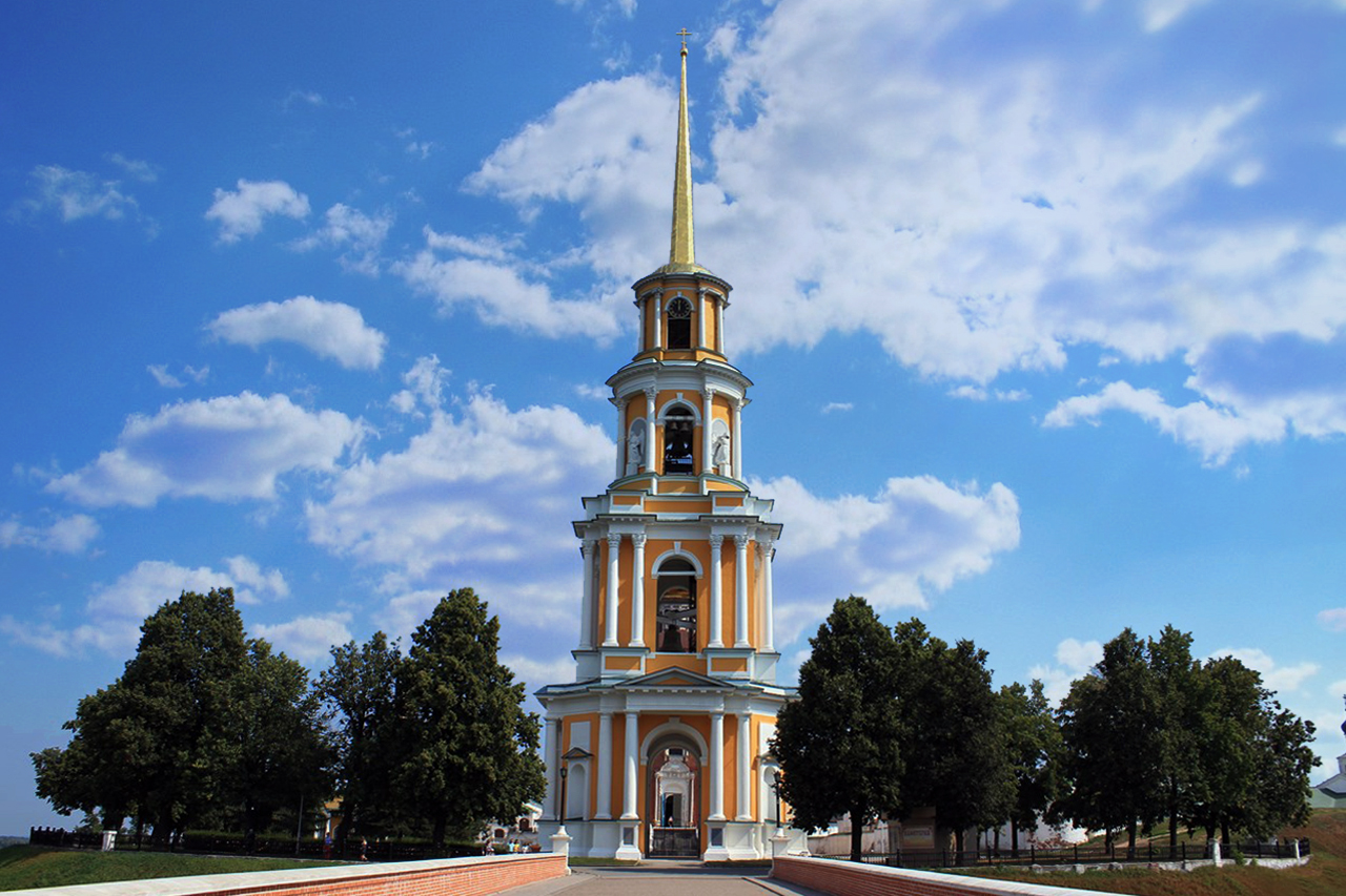 Колокольня Рязанского Кремля